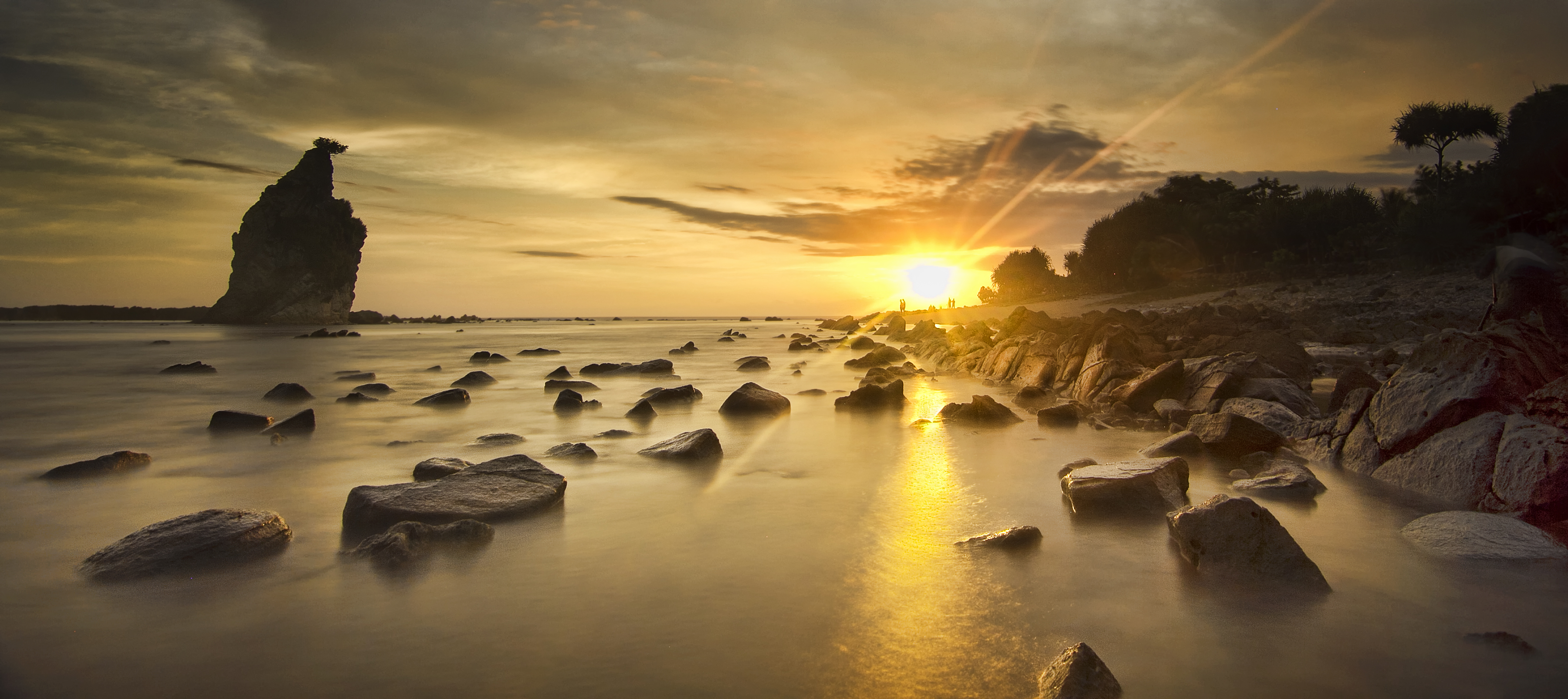 Tanjung layar merupakan salah satu tempat unggulan di daerah pantai sawarna..